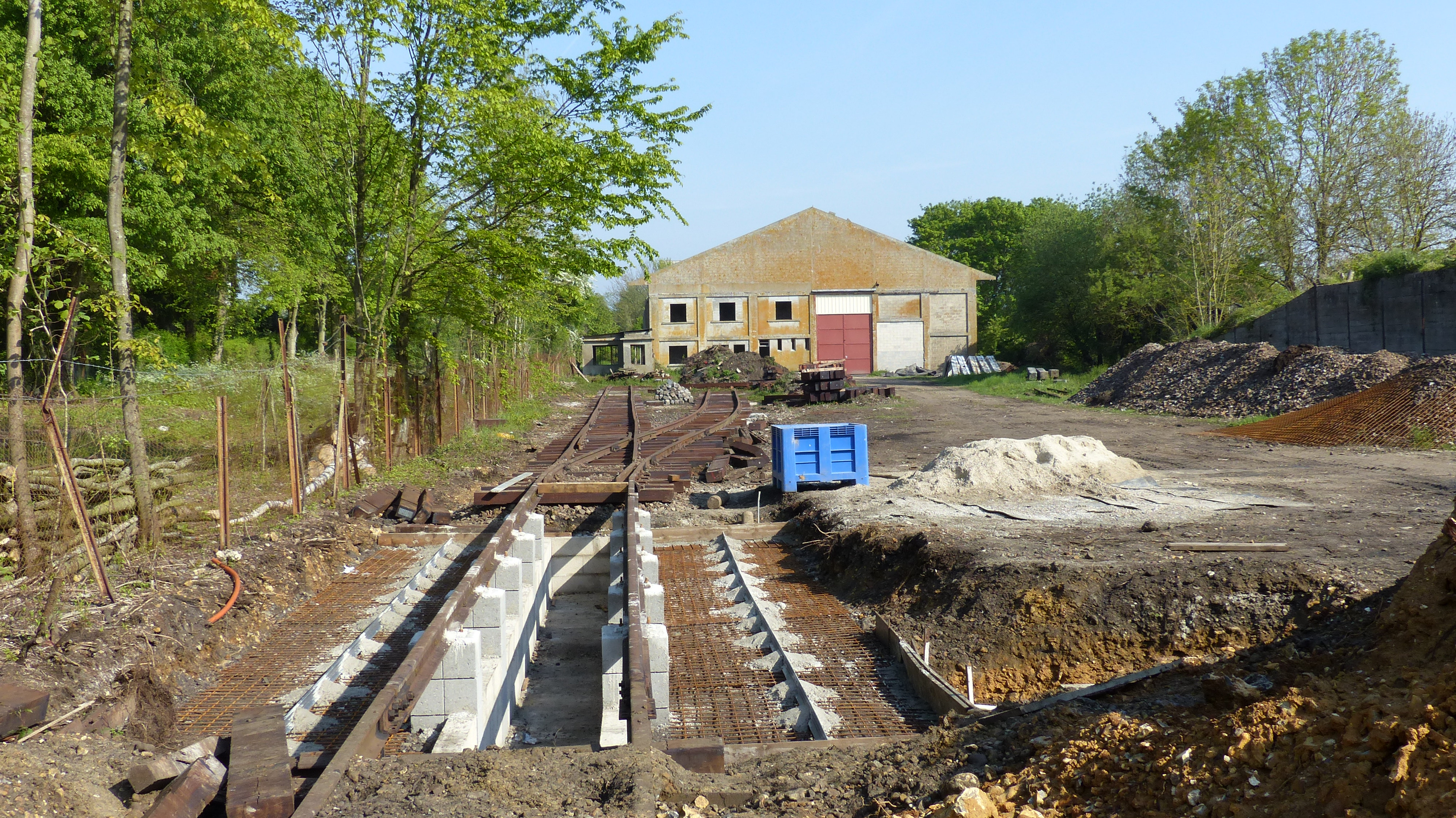 La nouvelle fosse de visite des locomotives, construite par le MTVS en gare de Crèvecœur-le-Grand en mai 2014